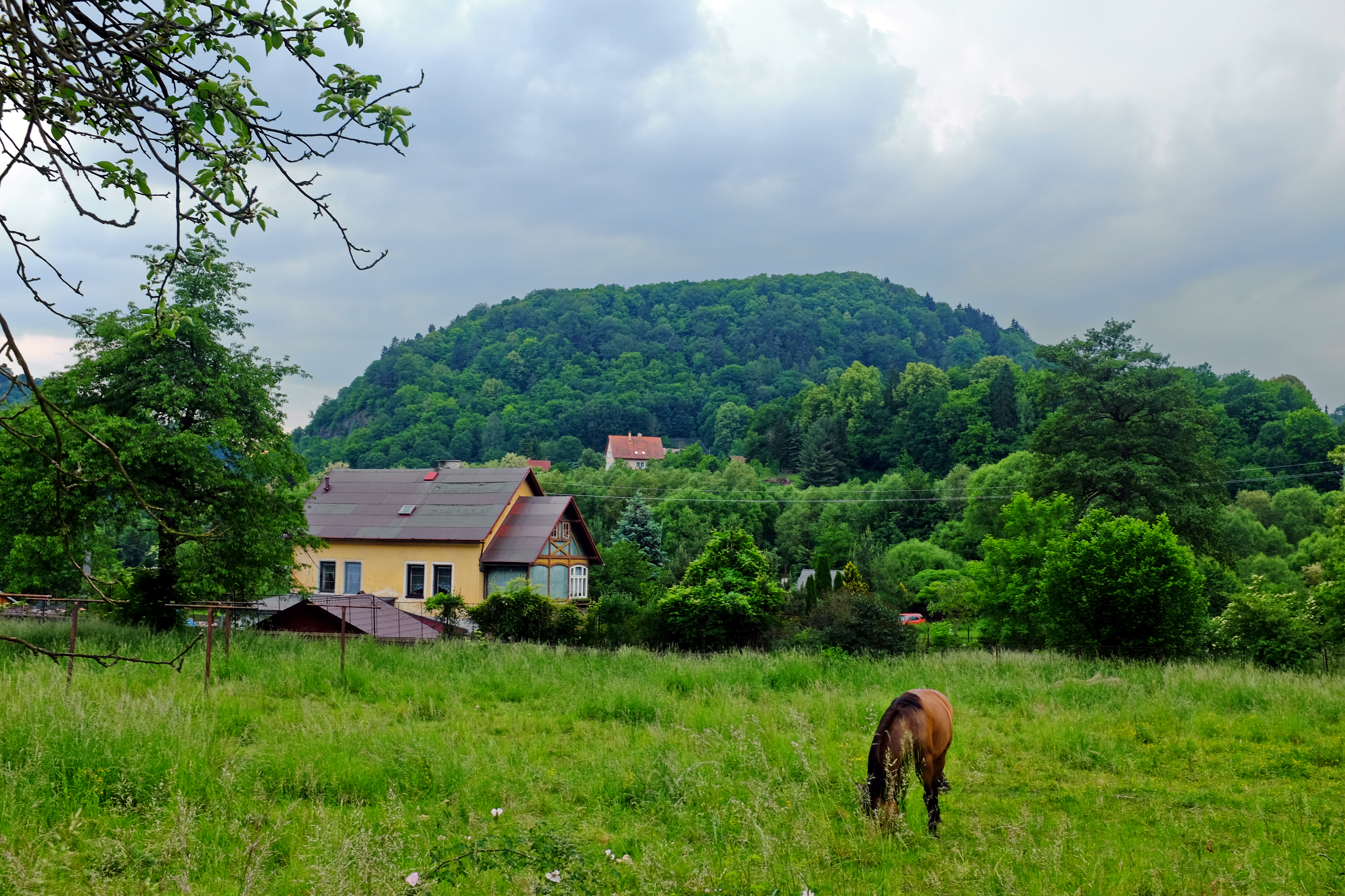 Velichov, Liščí vrch (486 m), okres Karlovy Vary